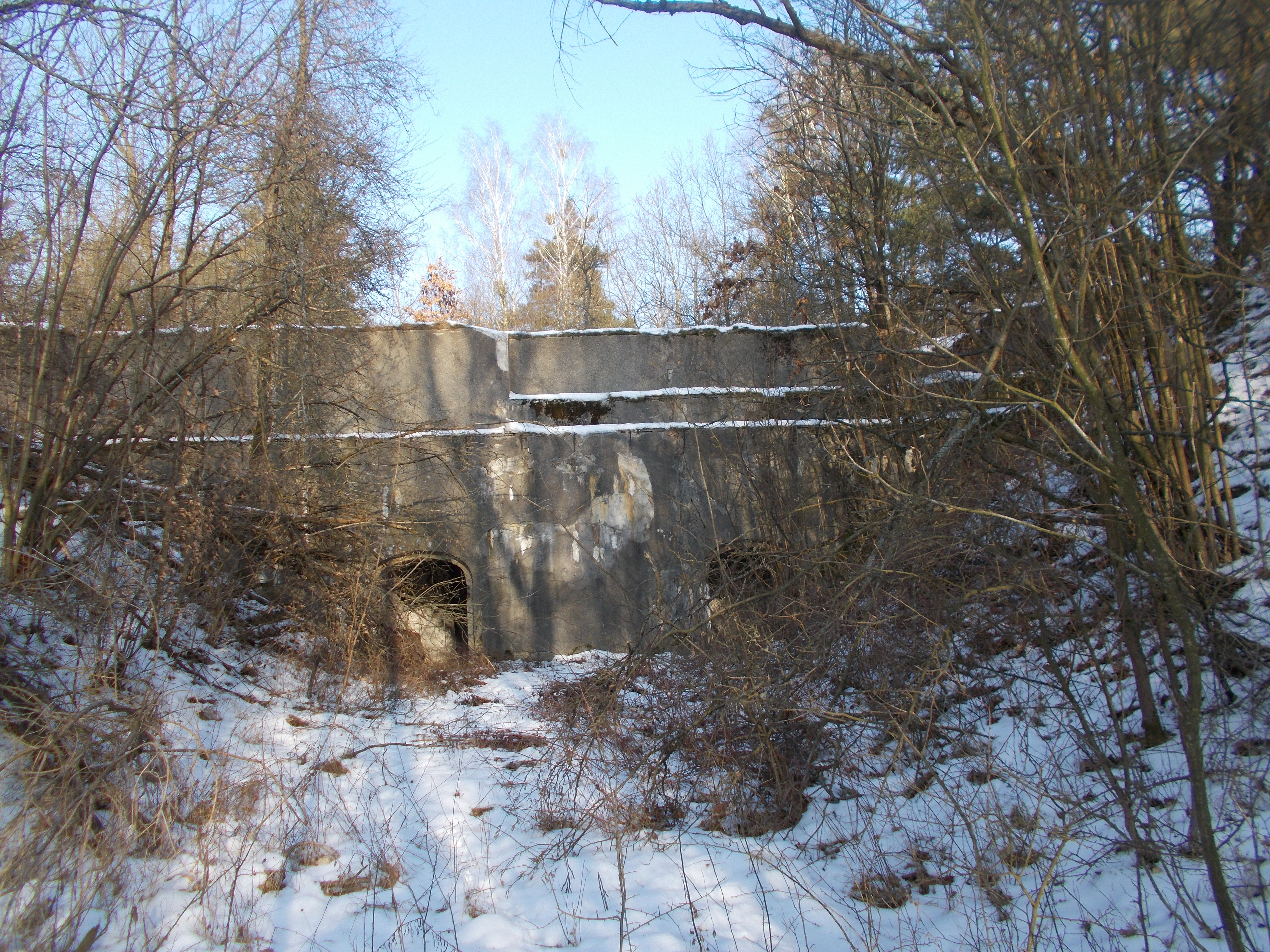 Fort główny - część środkowa